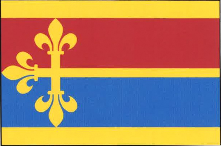 vlajka, Daleké Dušníky, okres Příbram